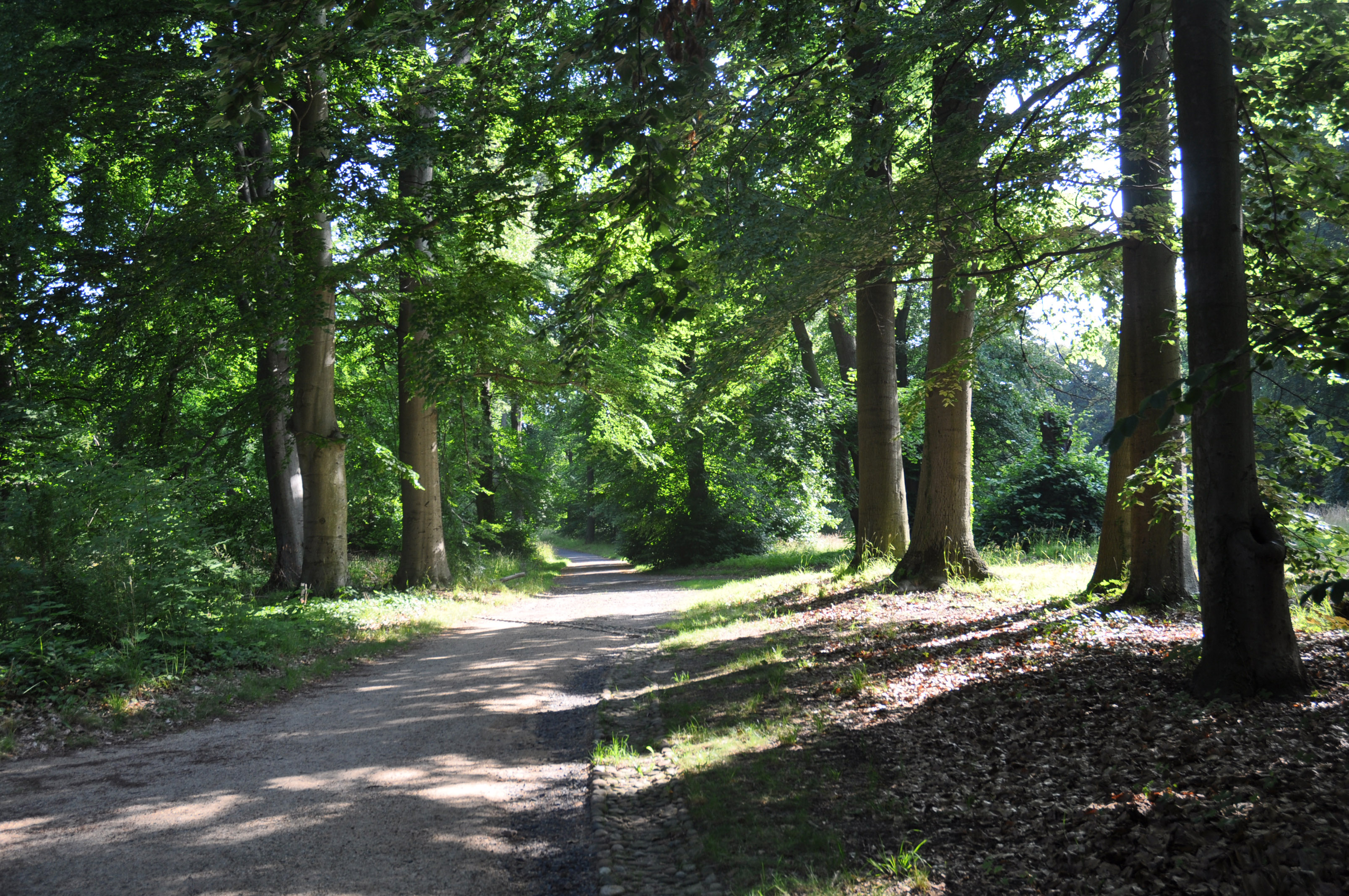 Der Westdrive mit Buchenbeständen nahe dem Schloss